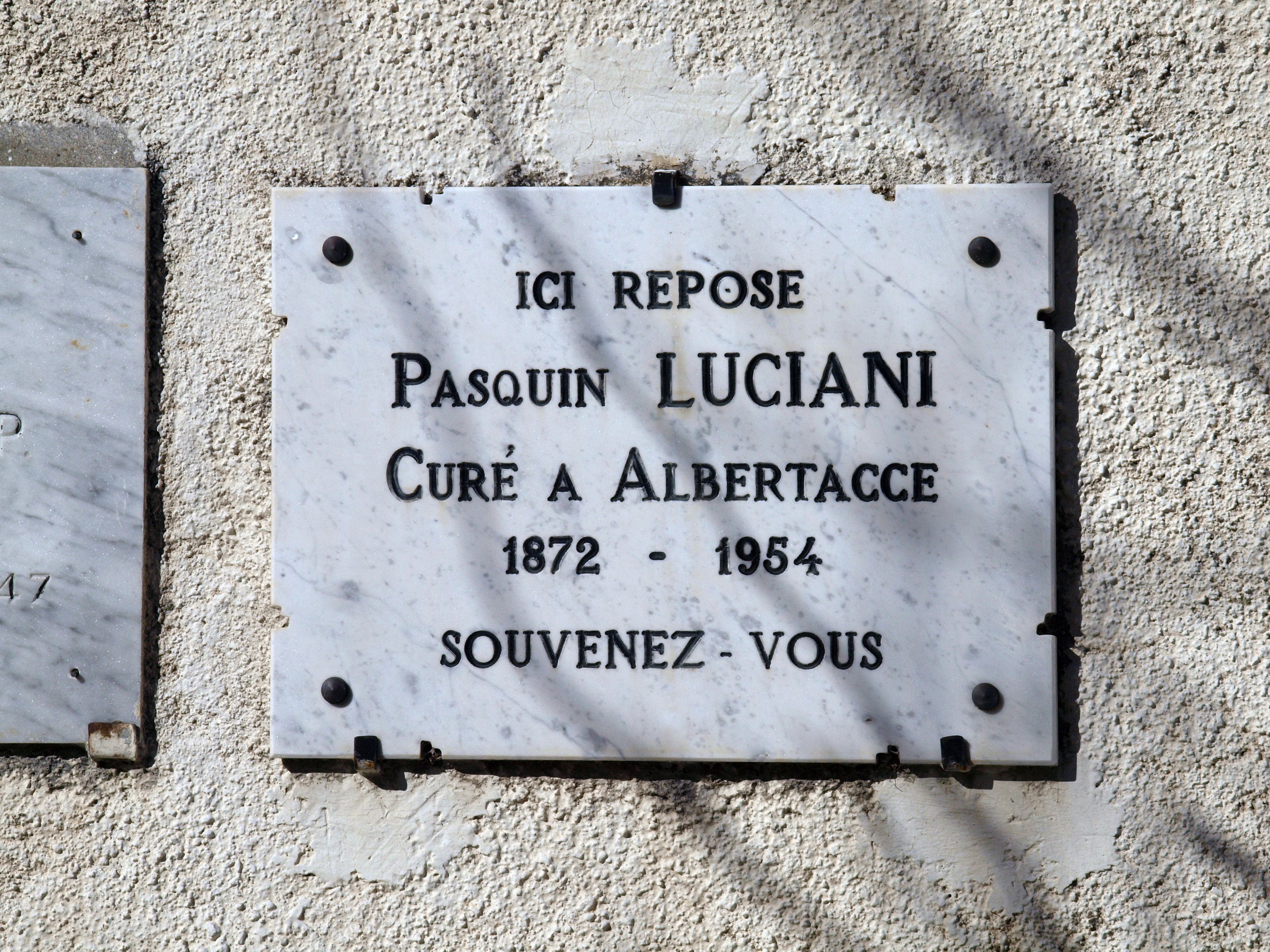 Albertacce, Niolo (Corse) - Plaque commémorative apposée sur la façade de l'église paroissiale Sainte-Marie